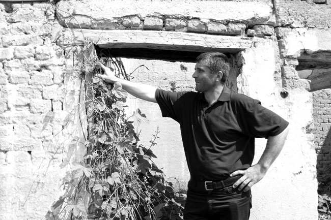 Косово и Метохија: Српски прогнаник крај своје порушене и у шибље зарасле породичне куће. Фотографије из пројекта "Корени душе". Фото:Дарко Дозет